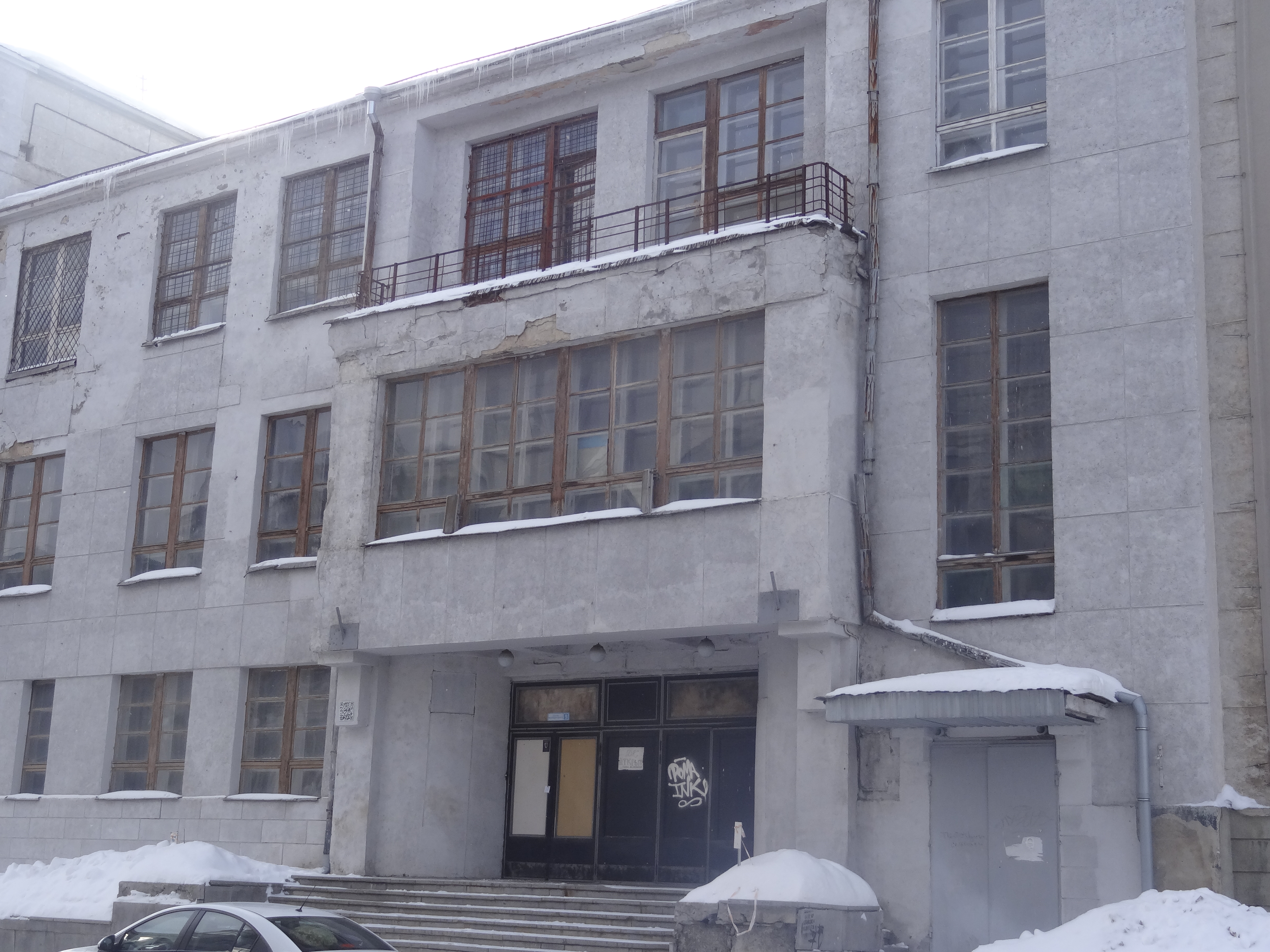 Дом культуры «Профинтерн» (ДК Свердлова). Памятник архитектуры. Адрес: Екатеринбург, улица Володарского, 9 / улица Урицкого, 8